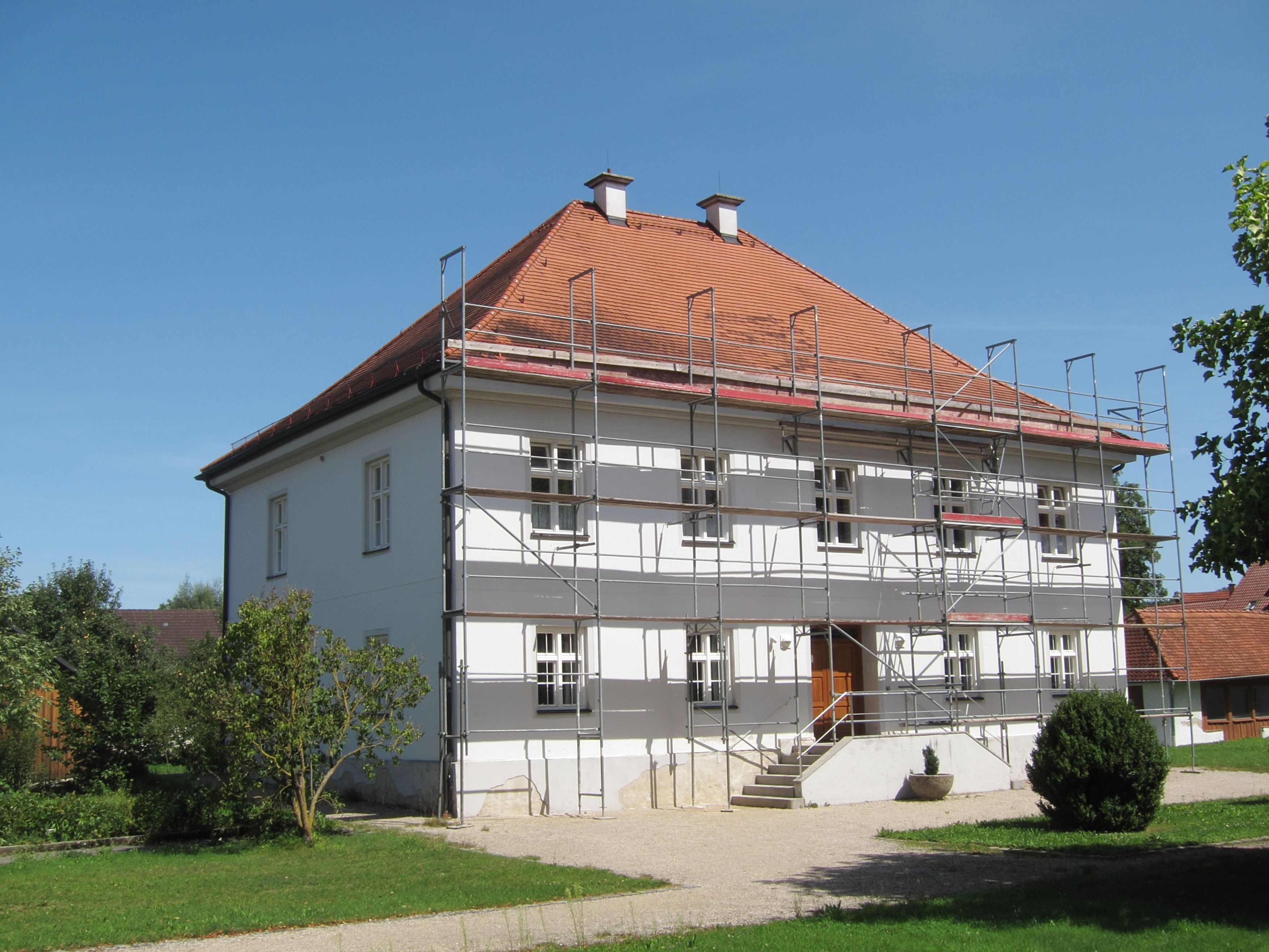 Langenpreising; Pfarrhaus, zweigeschossiger freistehender Walmdachbau, nach Plänen des Architekten Gustav Vorherr erbaut, 1812.